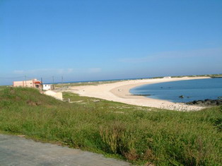 黃金海岸沙灘位於吉貝嶼後山，視野絕佳，可直接看到目斗嶼和過嶼。